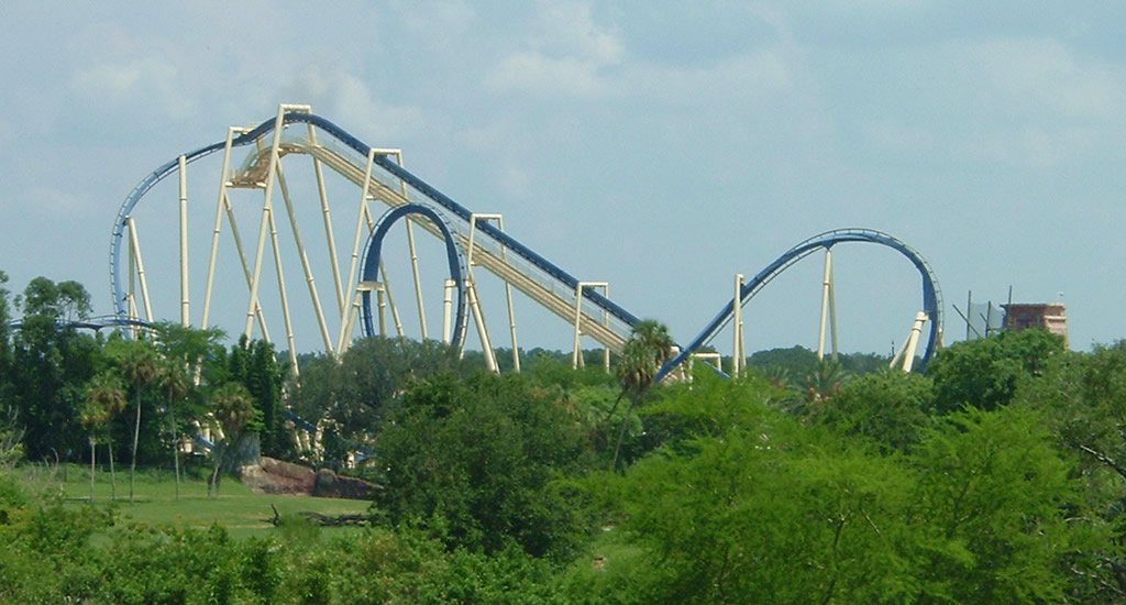 Montu , montagnes russes à Busch Gardens Africa